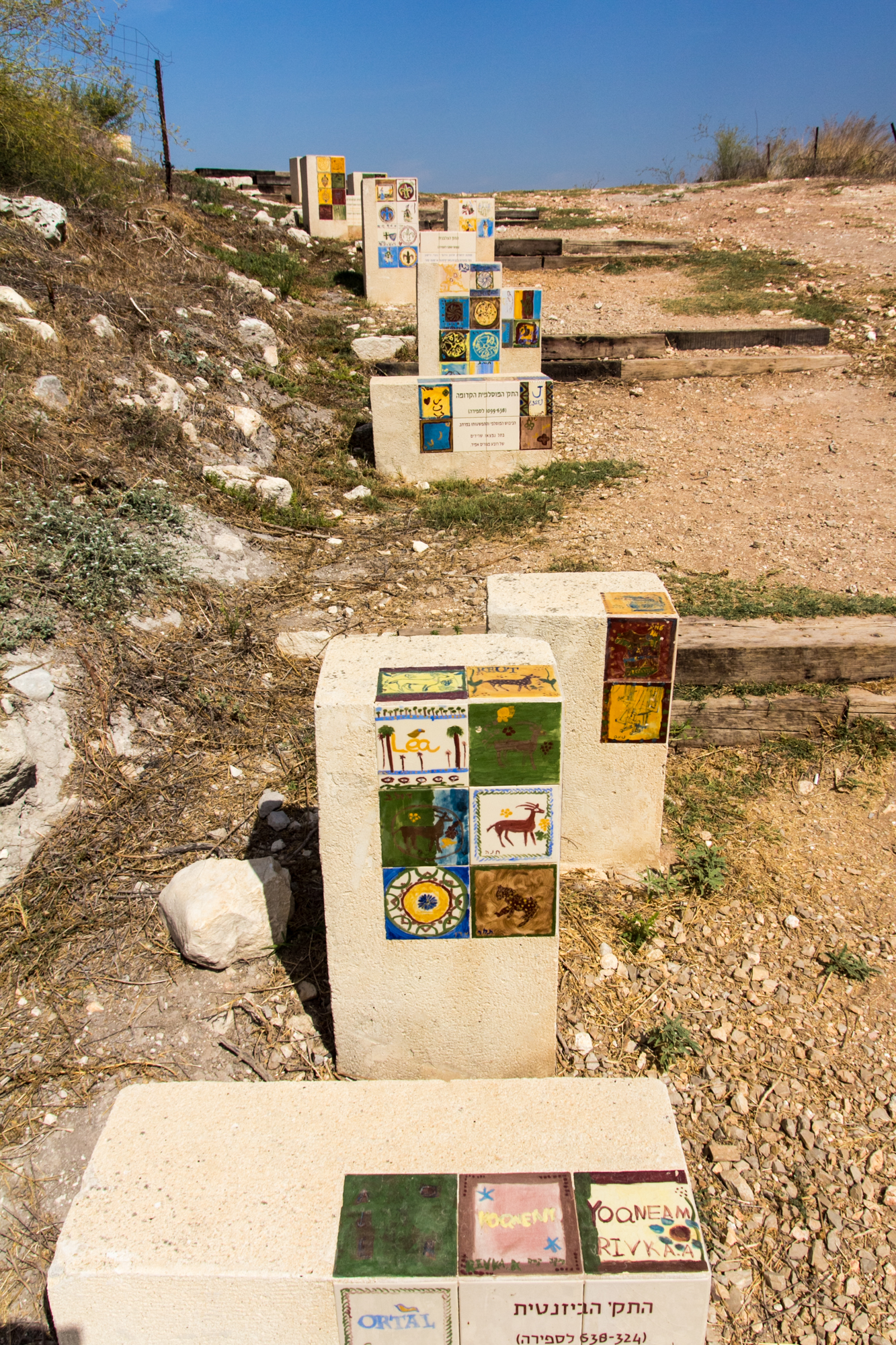 תֵּל יָקְנְעָם הוא תל גדול הנמצא בסמוך ליקנעם של ימינו, על גבול עמק יזרעאל ורכס הכרמל. תל יקנעם ממוקם בסמוך לאחת מהדרכים החשובות ביותר בעת העתיקה אשר עברה בואדי מילק וקישרה בין דרך הים (ויאה מריס) והדרך המובילה צפונה לעיר צור. נקודה זאת הקנתה ליקנעם העתיקה ערך אסטרטגי וכלכלי רב. התל ממוקם בגובה 70 מטר מעל פני הואדי.